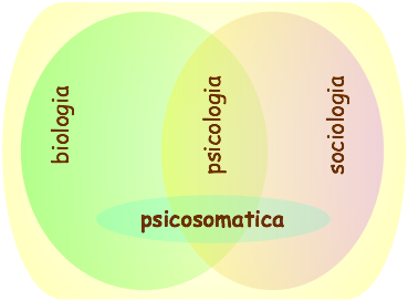 Grafica: Medicina: Fisiologia: Psicologia: Stress: Delimitazione di psicosomatica: biologia, sociologia, psicologia, medicina popolare, laica, complementare, non convenzionale, alternativa